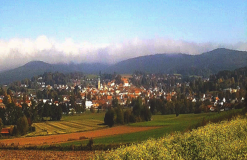 Blick über den Oberpfälzer Wald zum Kaltluftsee mit Hochnebel im Böhmischen Kessel